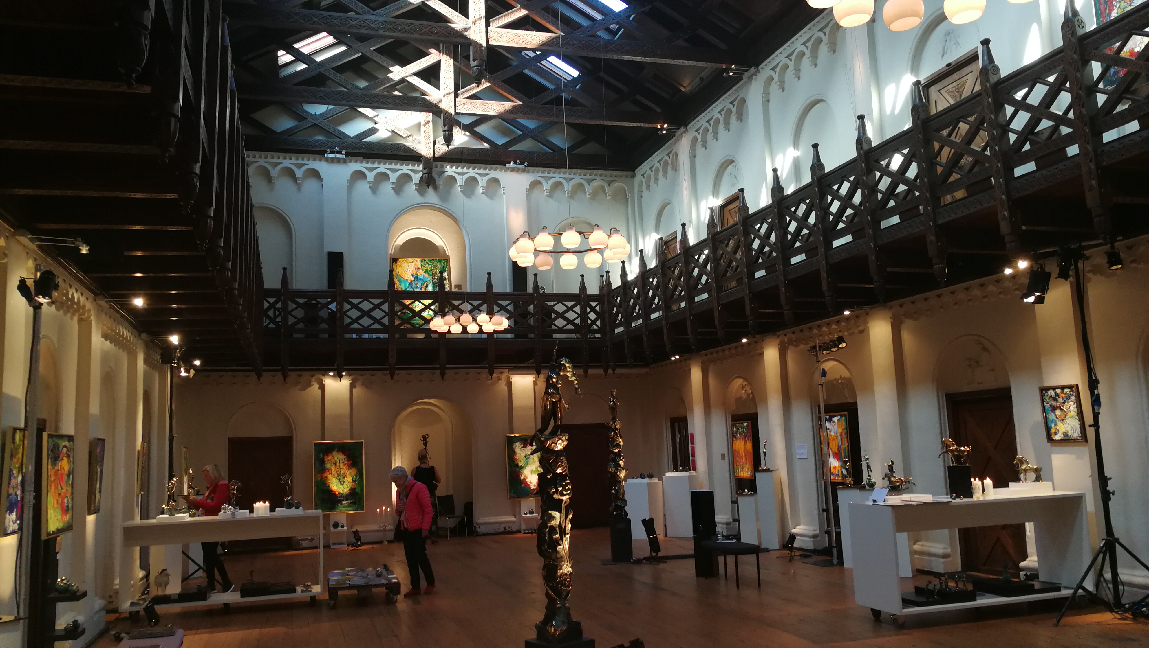 Bygningskulturens Hus